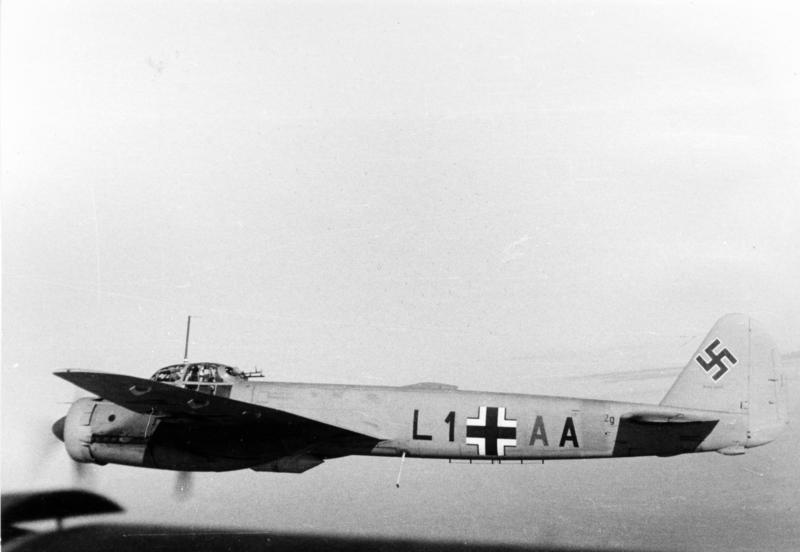 25.9.1941 Bildfolge: Ein Oberbürgermeister fliegt an die Front. Oberbürgermeister, Kreisleiter Dr. Rickel besucht das Lehrgeschwader 1, das seine Friedensgarnison in Greifswald hat, bei seinem Einsatz in Griechenland und Afrika. Rückflug von Afrika. In dichtem Verbandsflug geht es dem europäischen Kontinent zu. Ju 88, die Beherrscherin des östlichen Mittelmeeres! Die Ju 88 des Geschwaderkommodore [Major Friedrich Karl Knust] auf dem Rückflug von Afrika